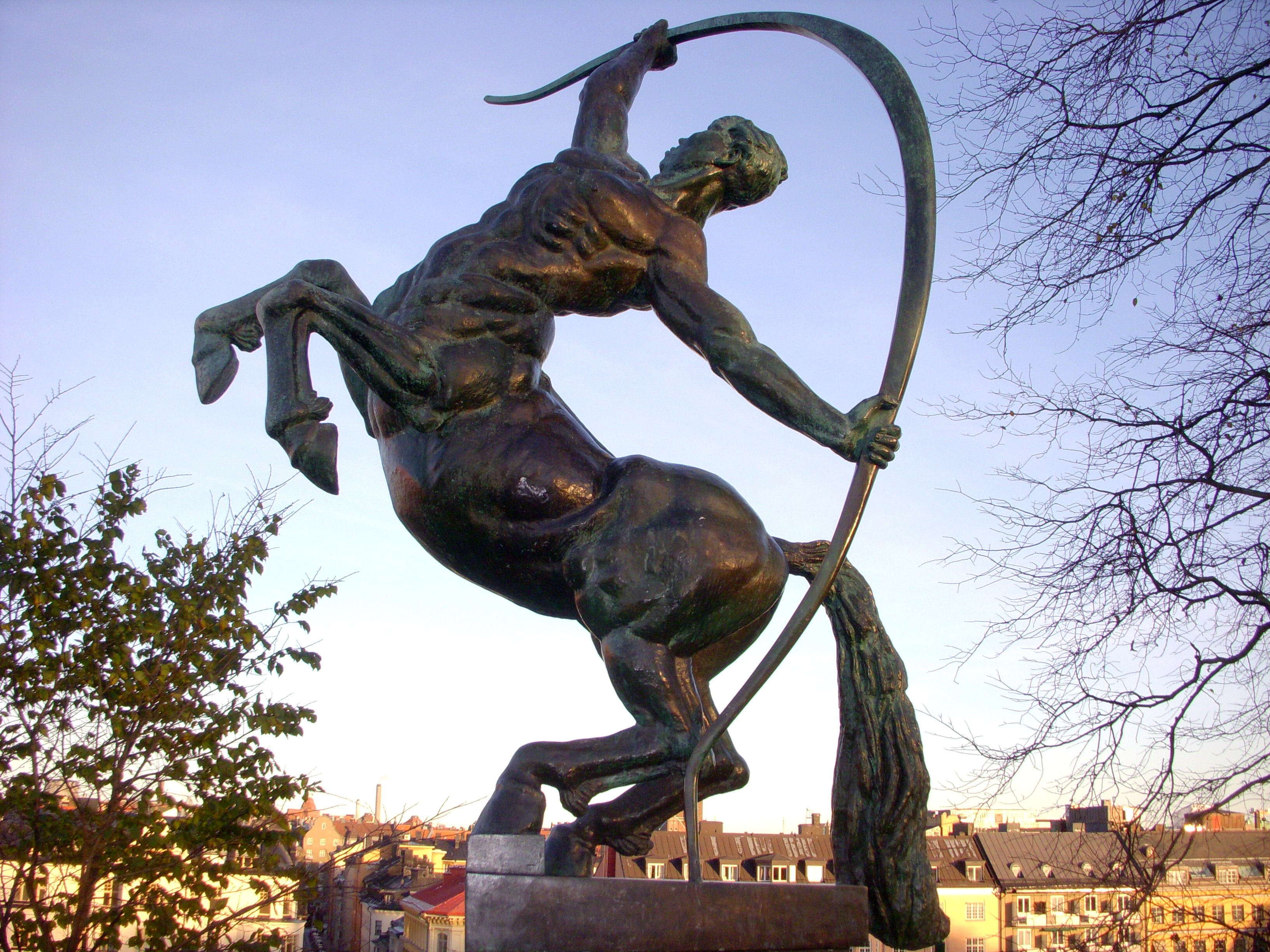 "Kentauren" skulptur på Observatoriekullen av Sigrid Fridman